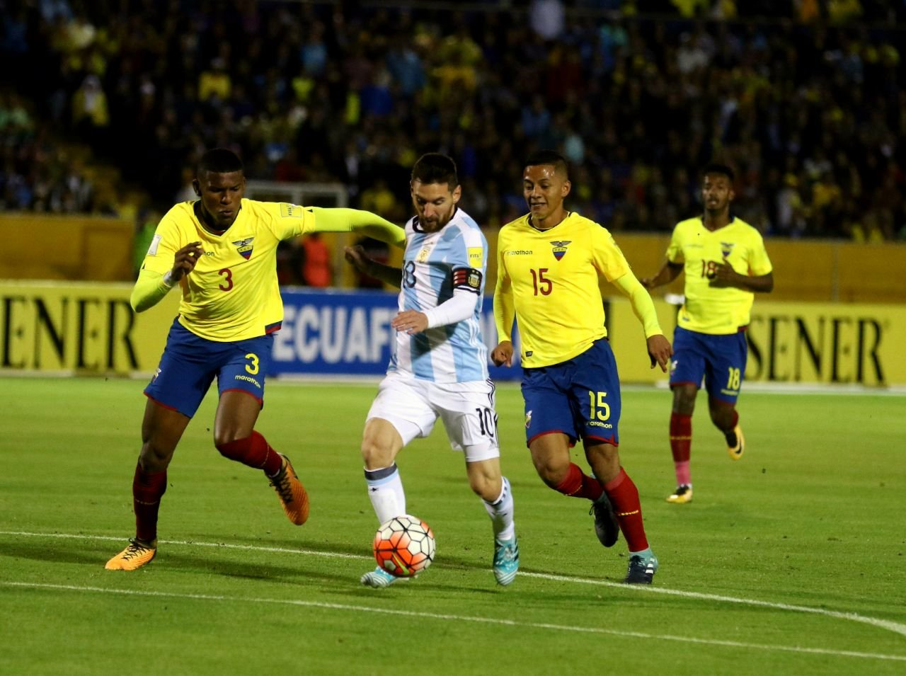 Quito, 10 oct (Andes).- Con tres tantos Argentina espantó los fantasmas de la eliminación, clasificó a su décima octava Copa del Mundo y venció 3-1 a un Ecuador que inició ganando el compromiso, disputado en el estadio Atahualpa de Quito, pero que no supo contener a uno de los mejores jugadores del mundo. ANDES/Micaela Ayala V.